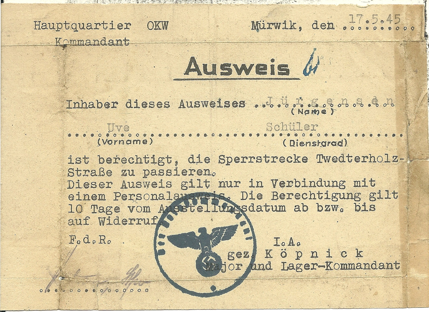 Passierschein zum Überqueren der Twedterholzstraße in Mürwik (Originalgröße 10,5 x 15 cm) - bemerkenswert ist, daß er vom Oberkommando der Wehrmacht noch neun Tage nach der bedingungslosen Kapitalutaion ausgestellt wurde. (Bis zum 23. Mai 1945 residierte die letzte deutsche Reichsregierung Dönitz in der Marineschule Mürwik.)